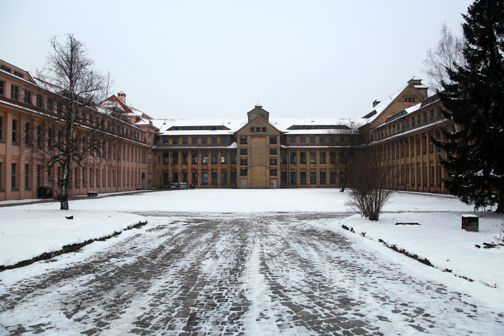 Königliches Feuerwerkslaboratorium Radeberg, Zünderwerkstatt